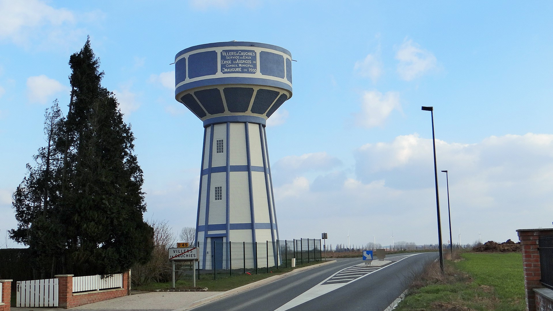 Château d'eau de Villers en Cauchies érigée en 1930 (et ravalé en 2017)